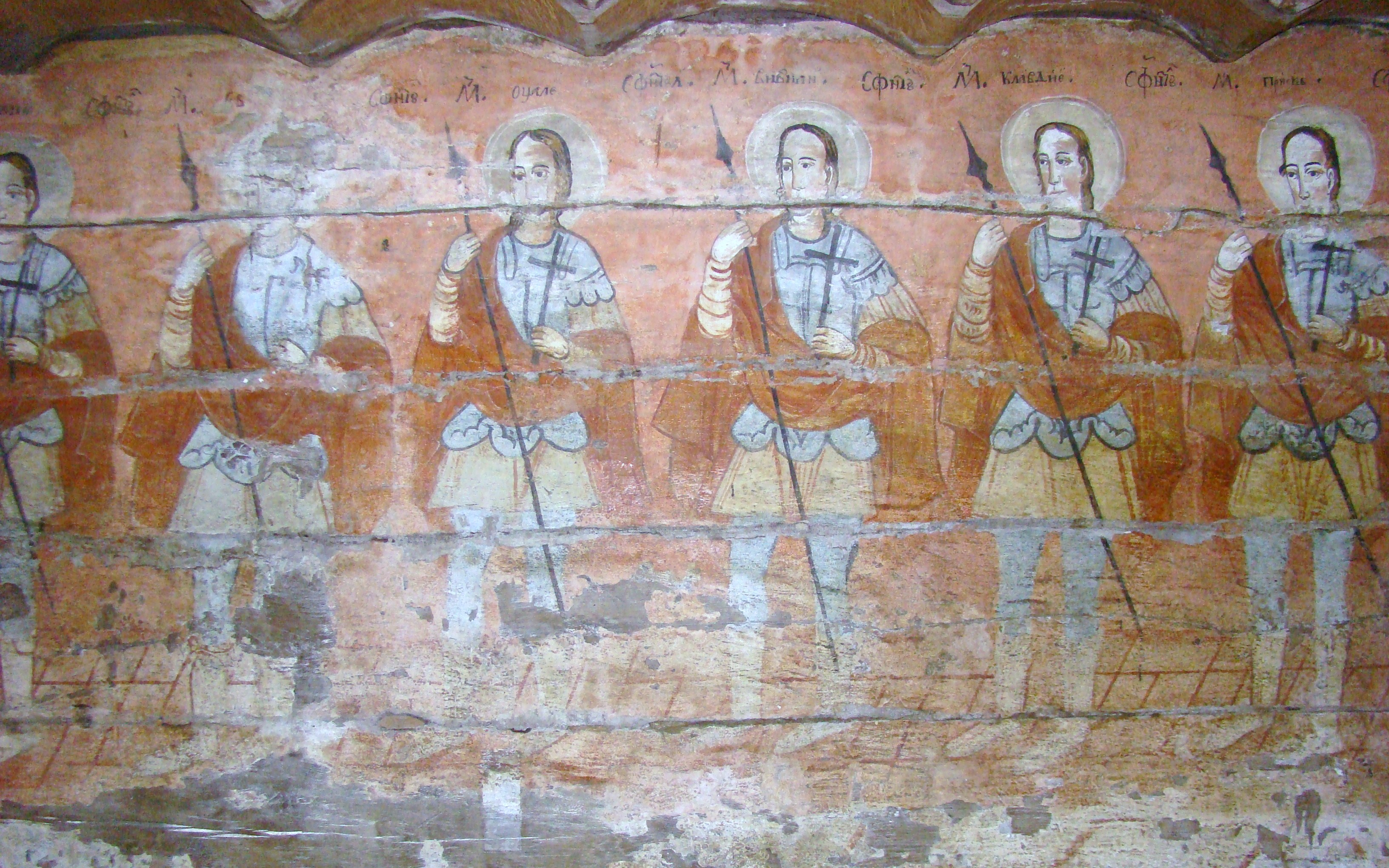 Biserica de lemn din Racâș, județul Sălaj